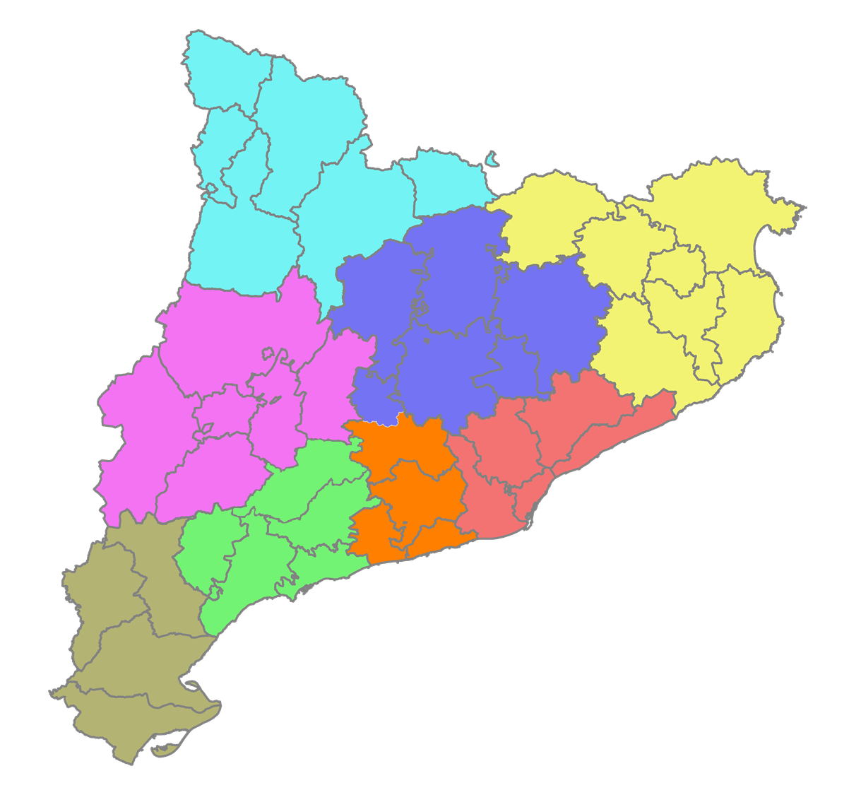 Àmbits del Pla Territorial de Catalunya, 2016 Àmbit metropolità Camp de Tarragona Penedès Comarques Centrals Ponent Comarques Gironines Alt Pirineu i Aran Terres de l'Ebre